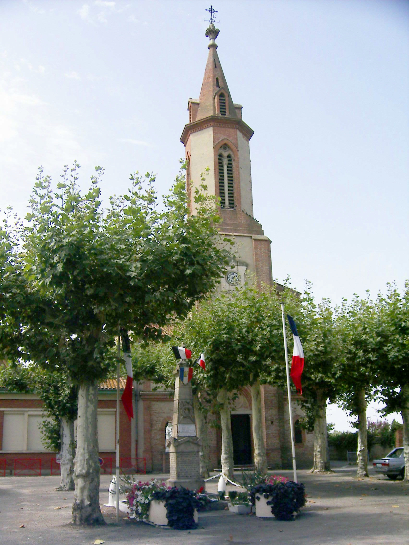 Une vue du monument aux morts et du clocher de l'église de La Ville-Dieu-du-Temple, commune de Tarn-et-Garonne, située près de Montauban.